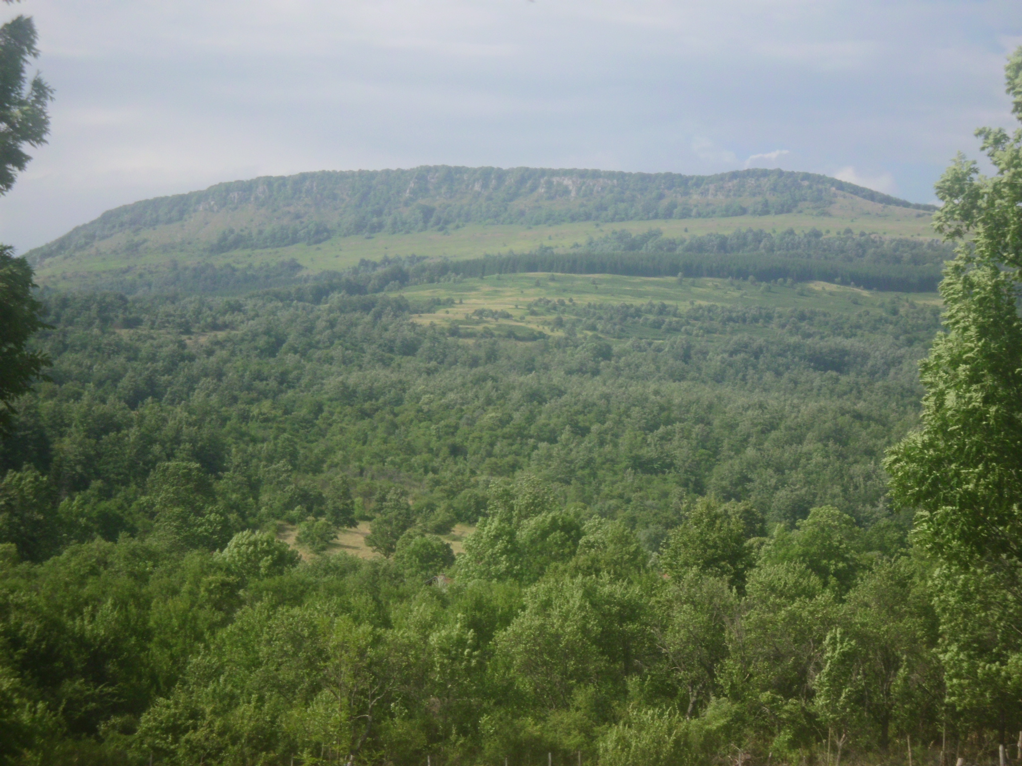 Један од планинских врхова Грмеча